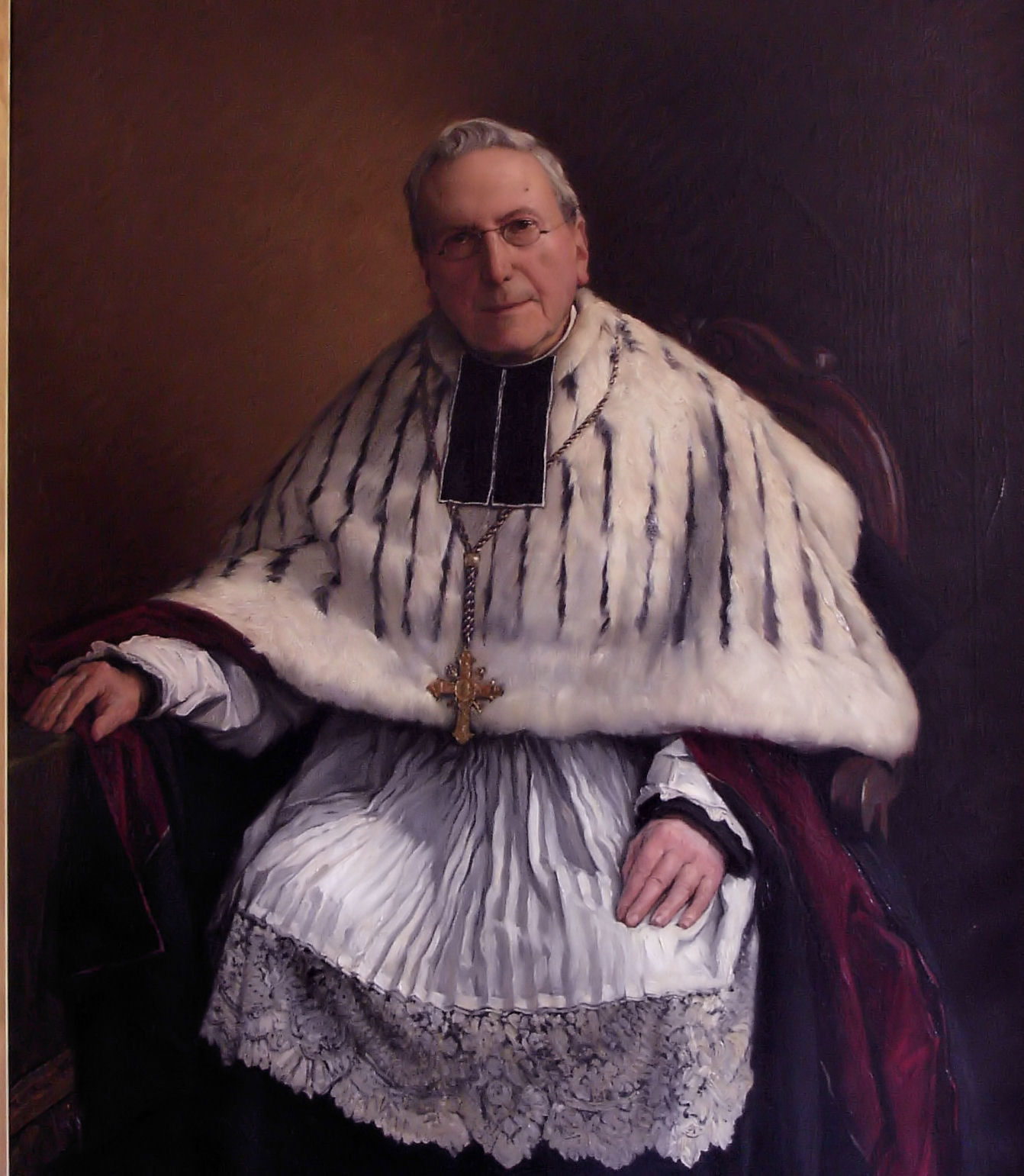 Petrus-Ludovicus Stillemans, leraar aan het Sint-Jozefgesticht te Sint-Niklaas vanaf 1849. Hij werd erekanunnik van Sint-Baafs in 1891.